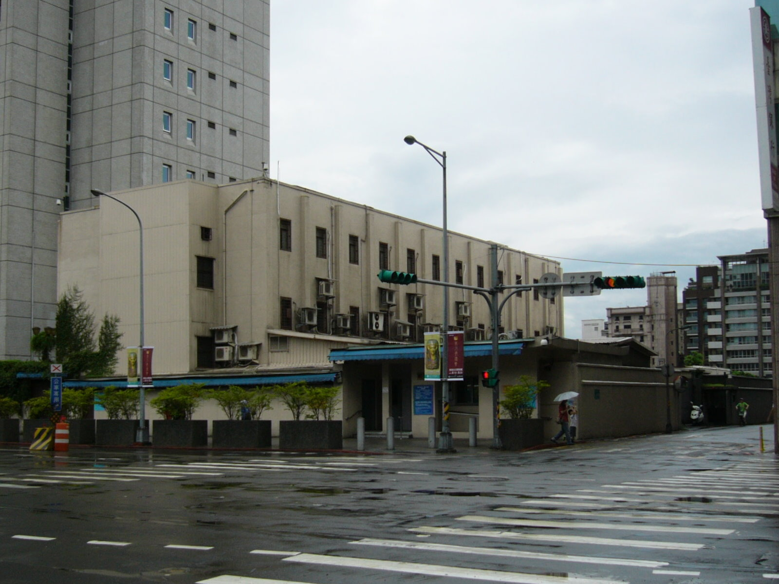 中文（台灣）: 雨中的美國在台協會台北辦事處，地址：臺北市大安區信義路三段134巷7號。